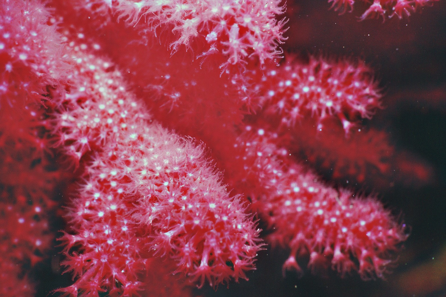 Gorgonie 4